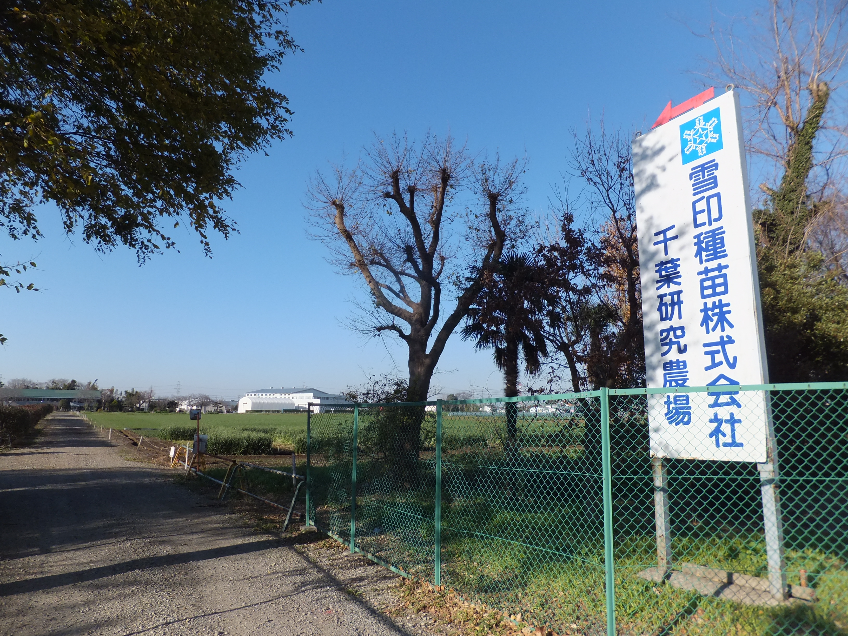 雪印種苗株式会社千葉研究農場